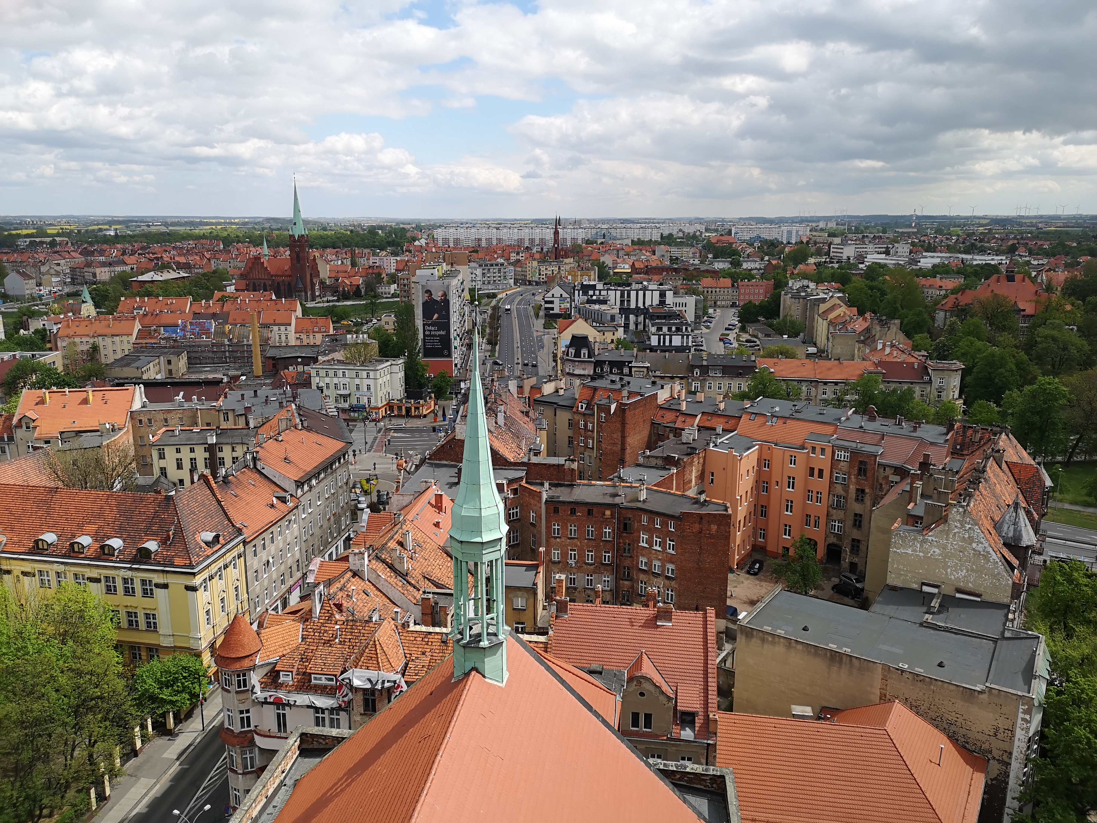 Widok na wschodnią część Legnicy z wieży Kościoła Ewangelickiego.